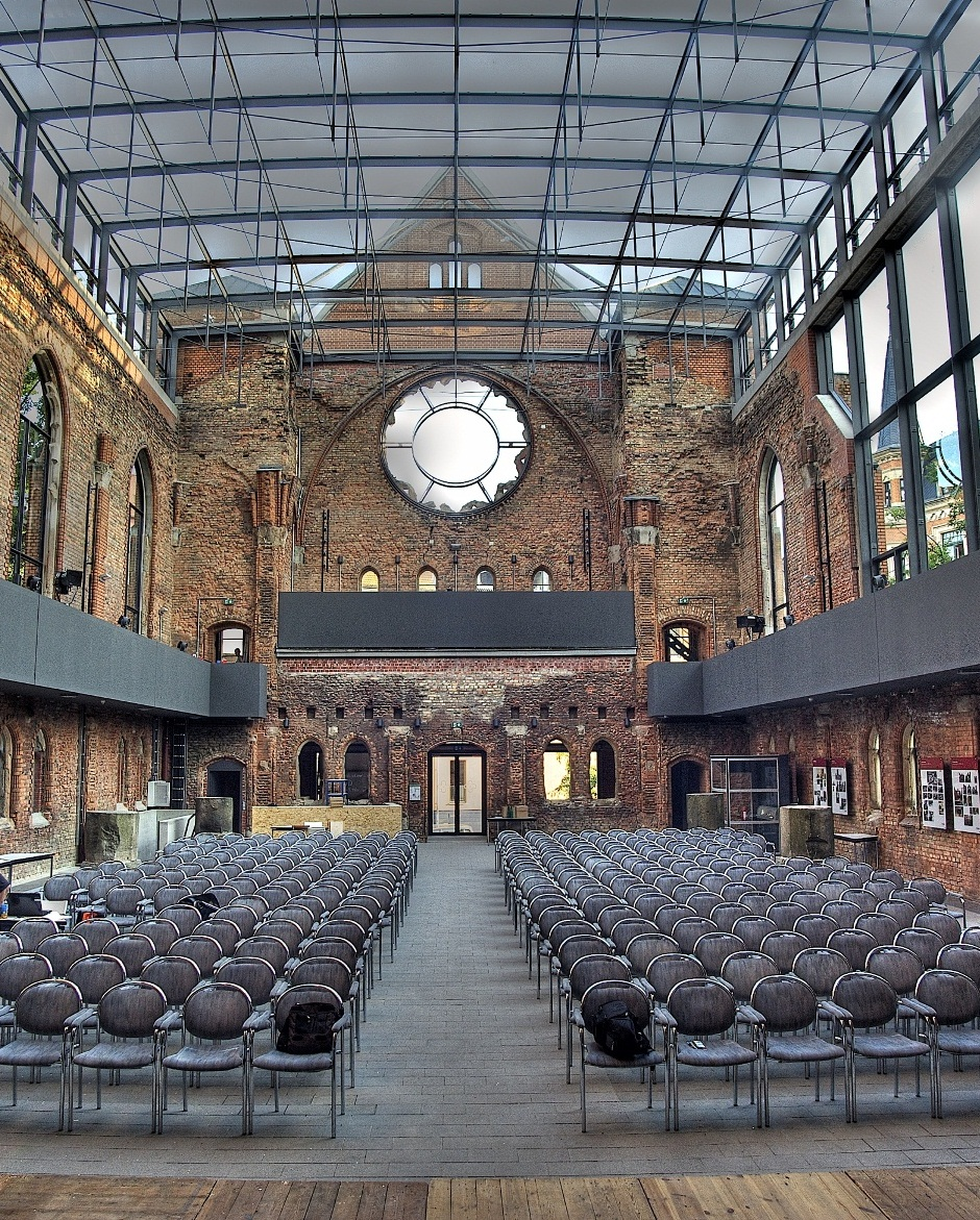 Theater in der Ruine der St.-Pauli-Kirche in Dresden-Neustadt, Auditorium